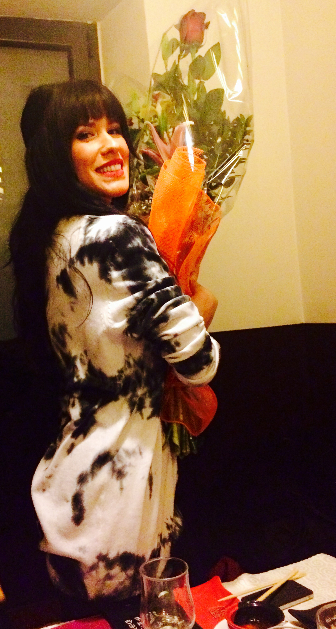 Baby K (pseudonimo di Claudia Nahum), rapper e cantante italiana.